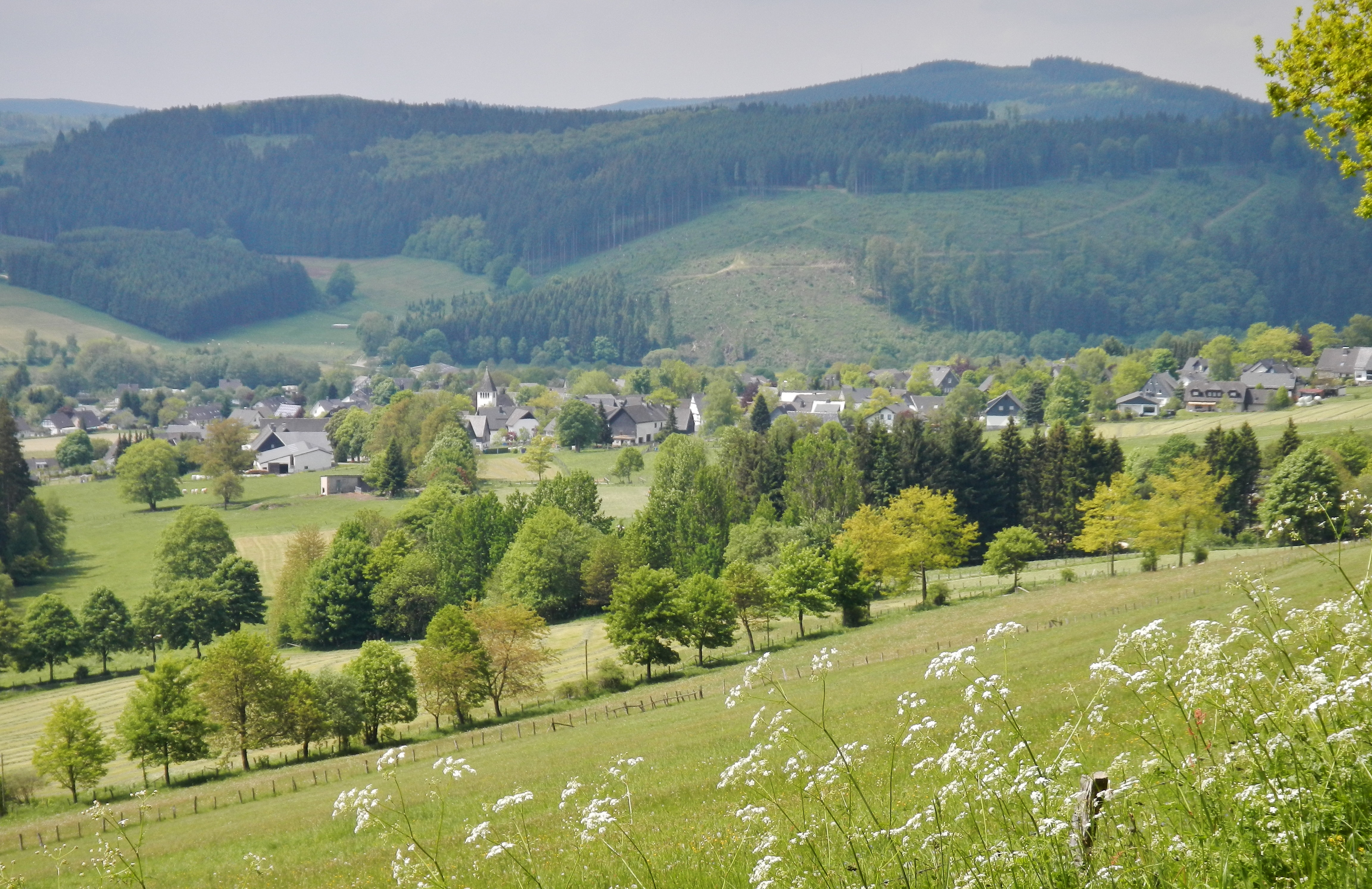 Hildfeld; vorne Landschaftsschutzgebiet Kulturlandschaftskomplex Grönebach / Hildfeld; Wald hinten gehört zum LSG Winterberg